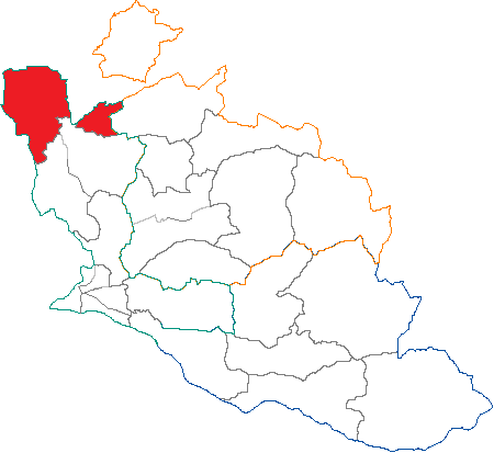 Situation du canton dans le département de Vaucluse (France)